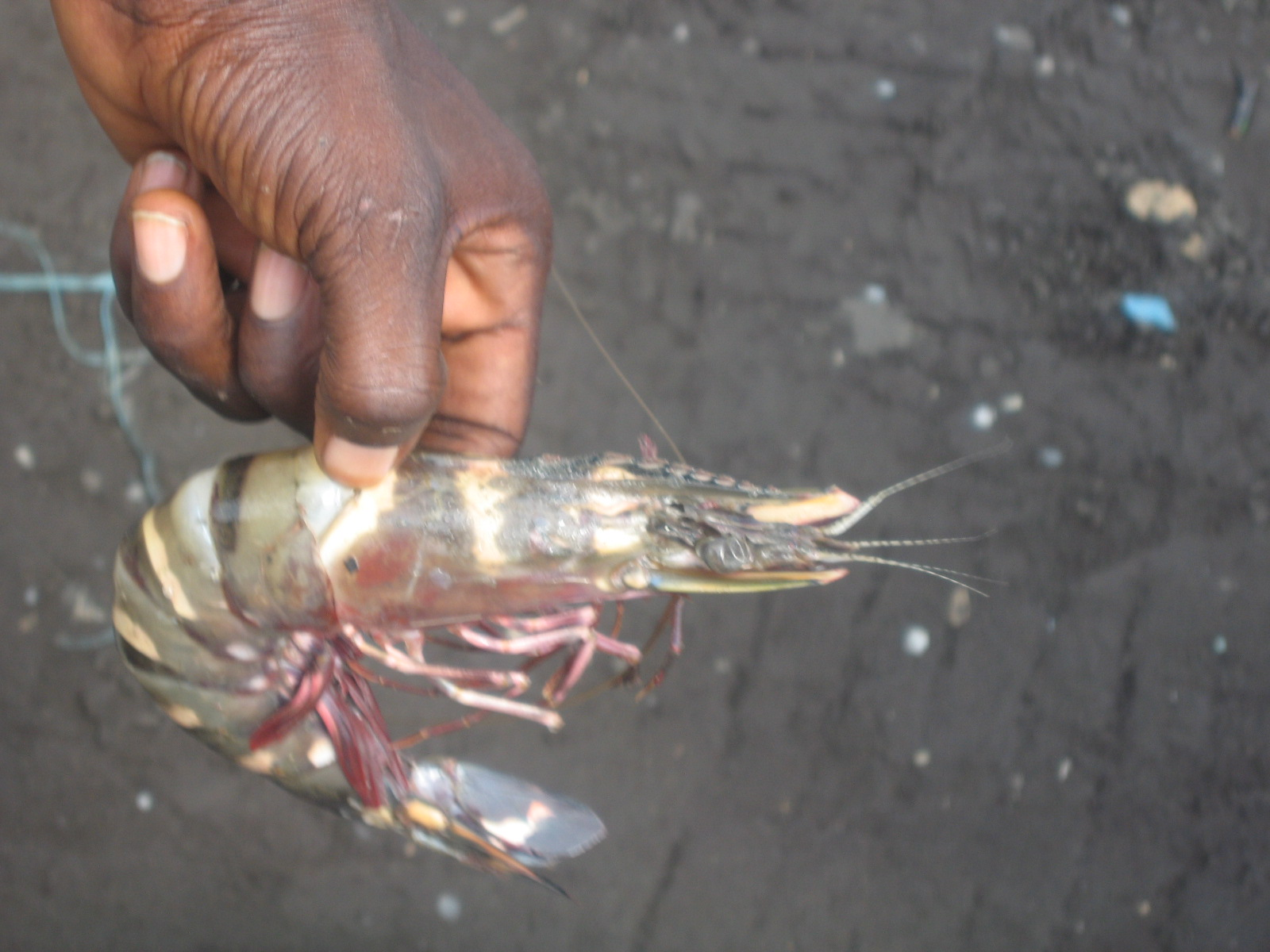 Crevette pechée à Limbé, Cameroun.